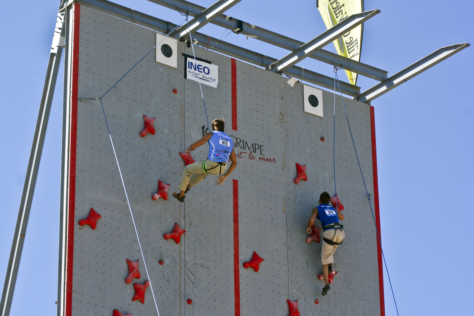 Championnats du monde d'escalade minime, cadet, junior 2009, Valence, Drôme, France